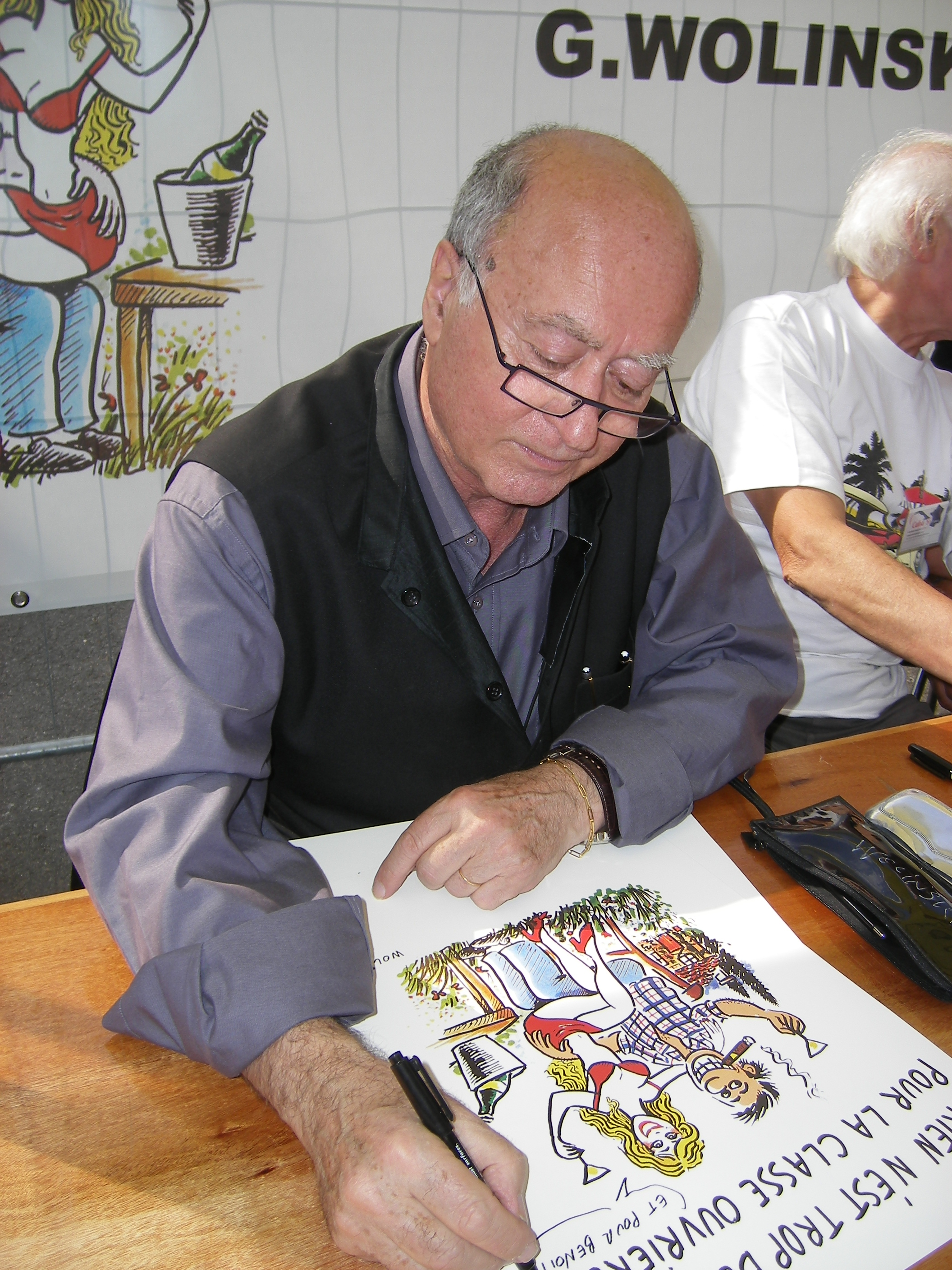 Georges Wolinski dédicaçant à la fête de l'Huma 2007. La phrase sur l'affiche est: « Rien n’est trop beau pour la classe ouvrière! ».